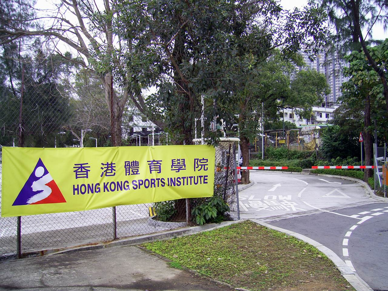 烏溪沙青年新村香港體育學院